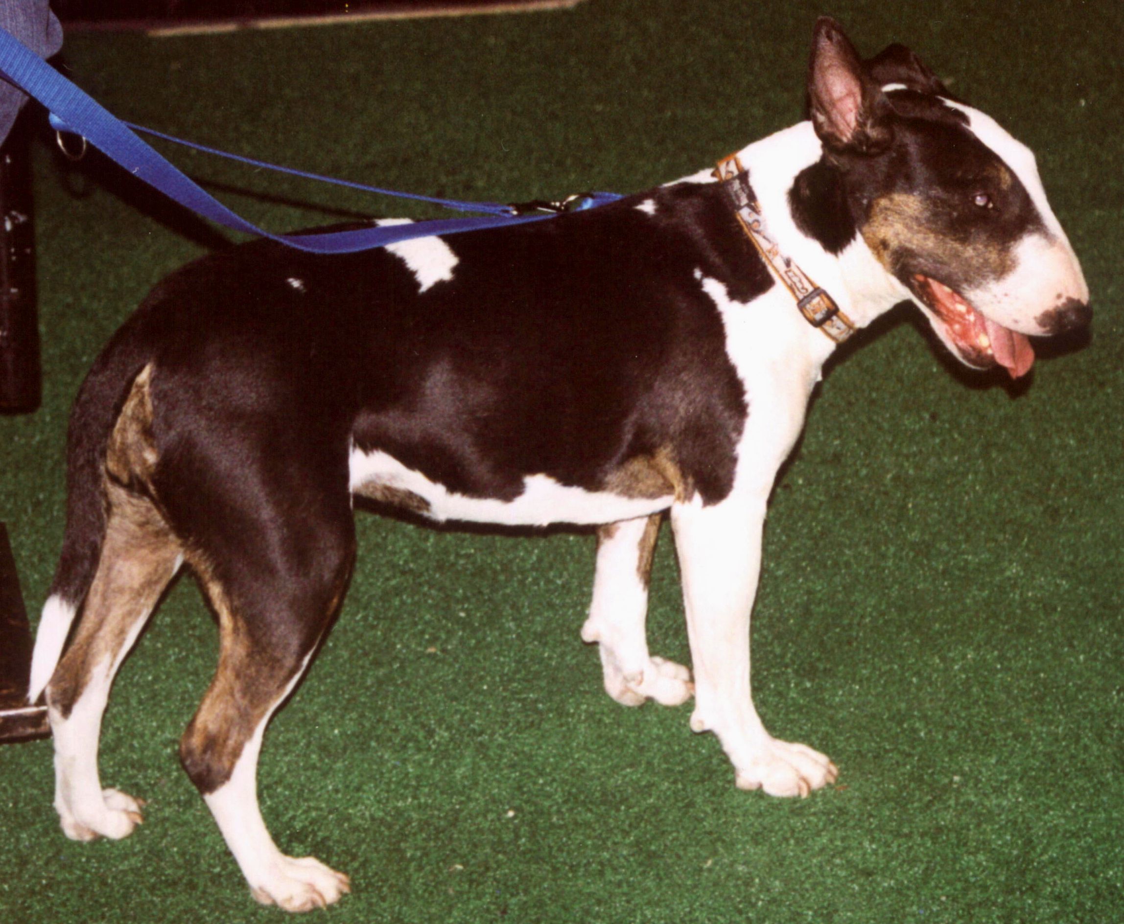 Bull_terrier